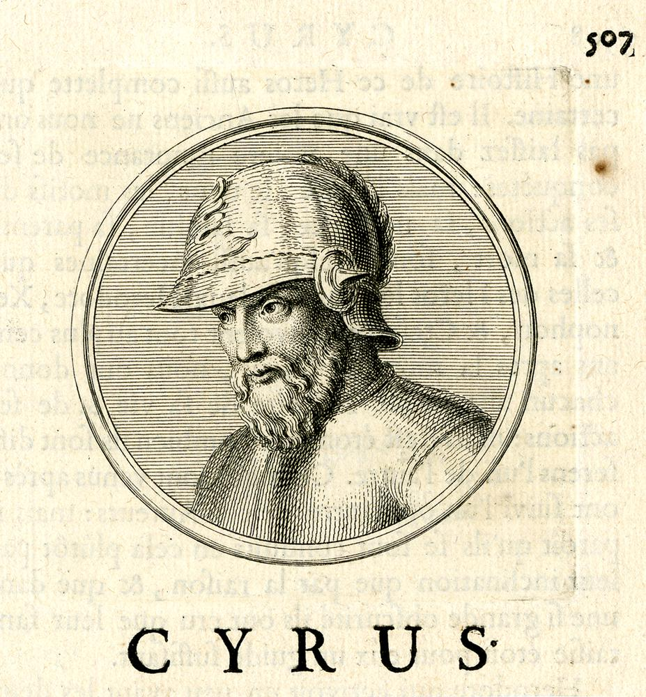 İngiliz Arşivinden Büyük Kiros gravürü